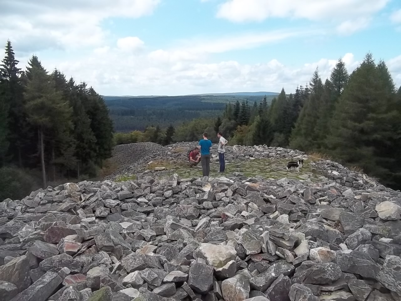 Touristes sur le mur nord du ringwall, ce qui permet d'en comprendre la taille